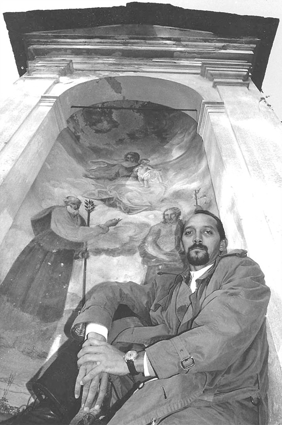 Il fumettista Carlo Ambrosini disegnatore di Dylan Dog, Napoleone e altri eroi della Bonelli Editore